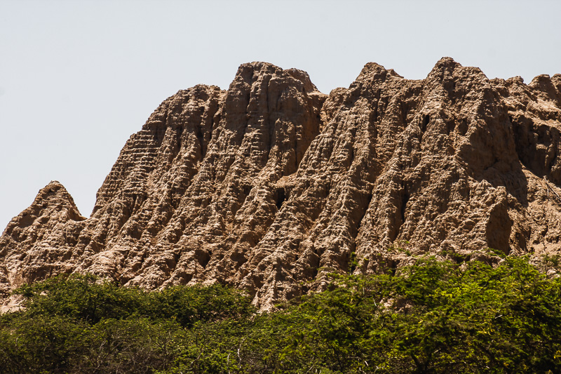 Bosque de Pómac, Lambayeque, Perú